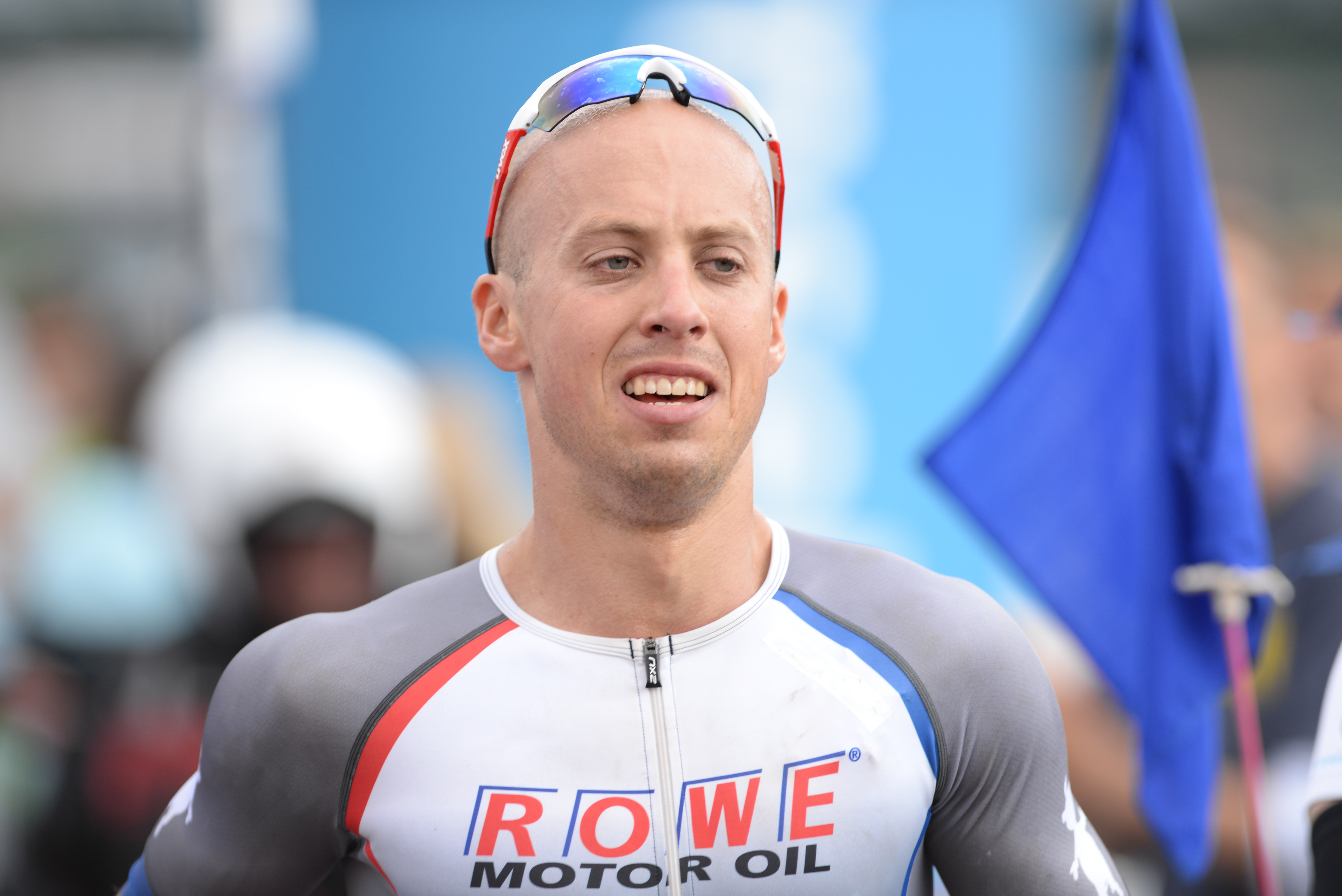 Ironman 2016, Starterlisten unter